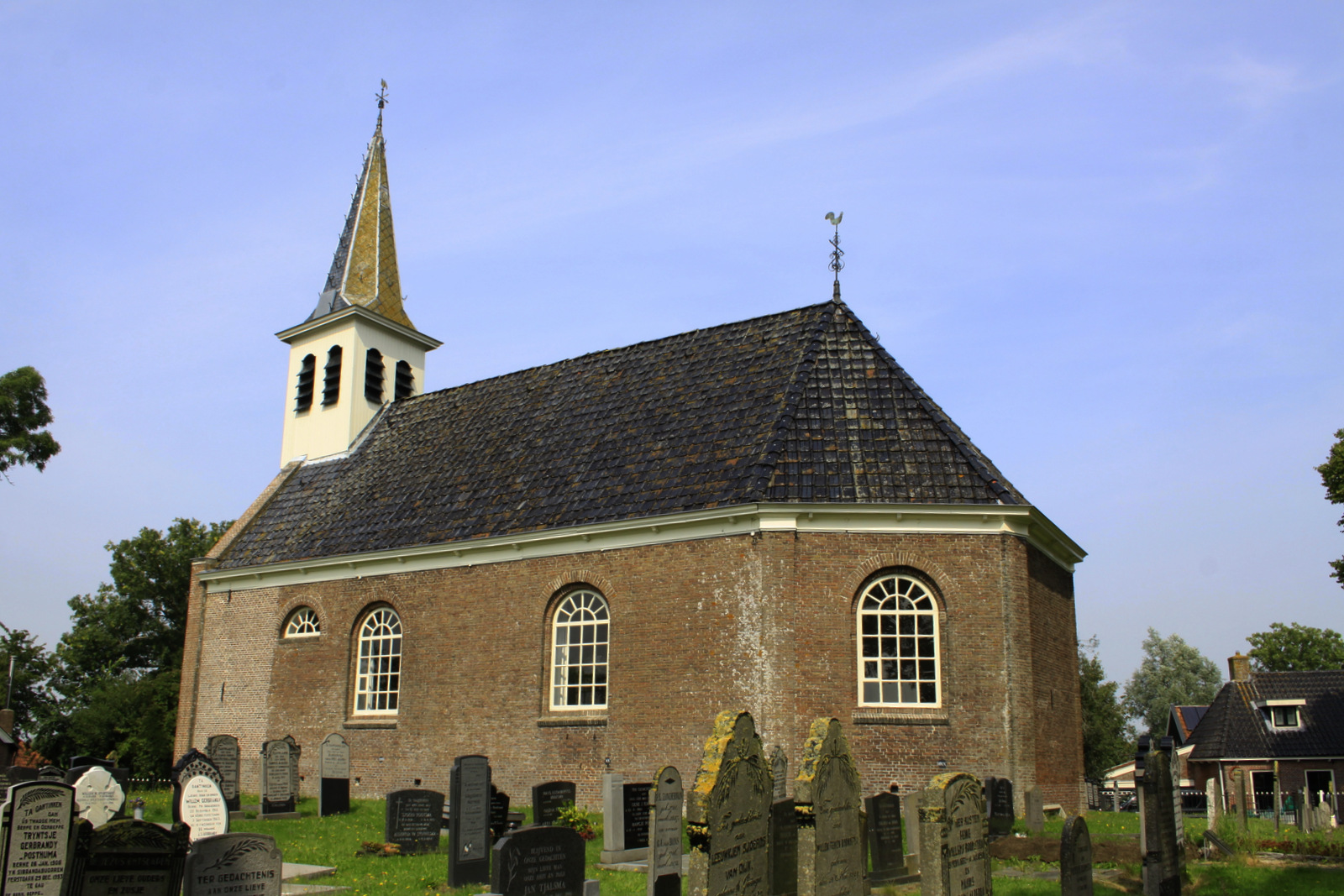 Het kerkje van Goenga staat hoog en droog op een terp.